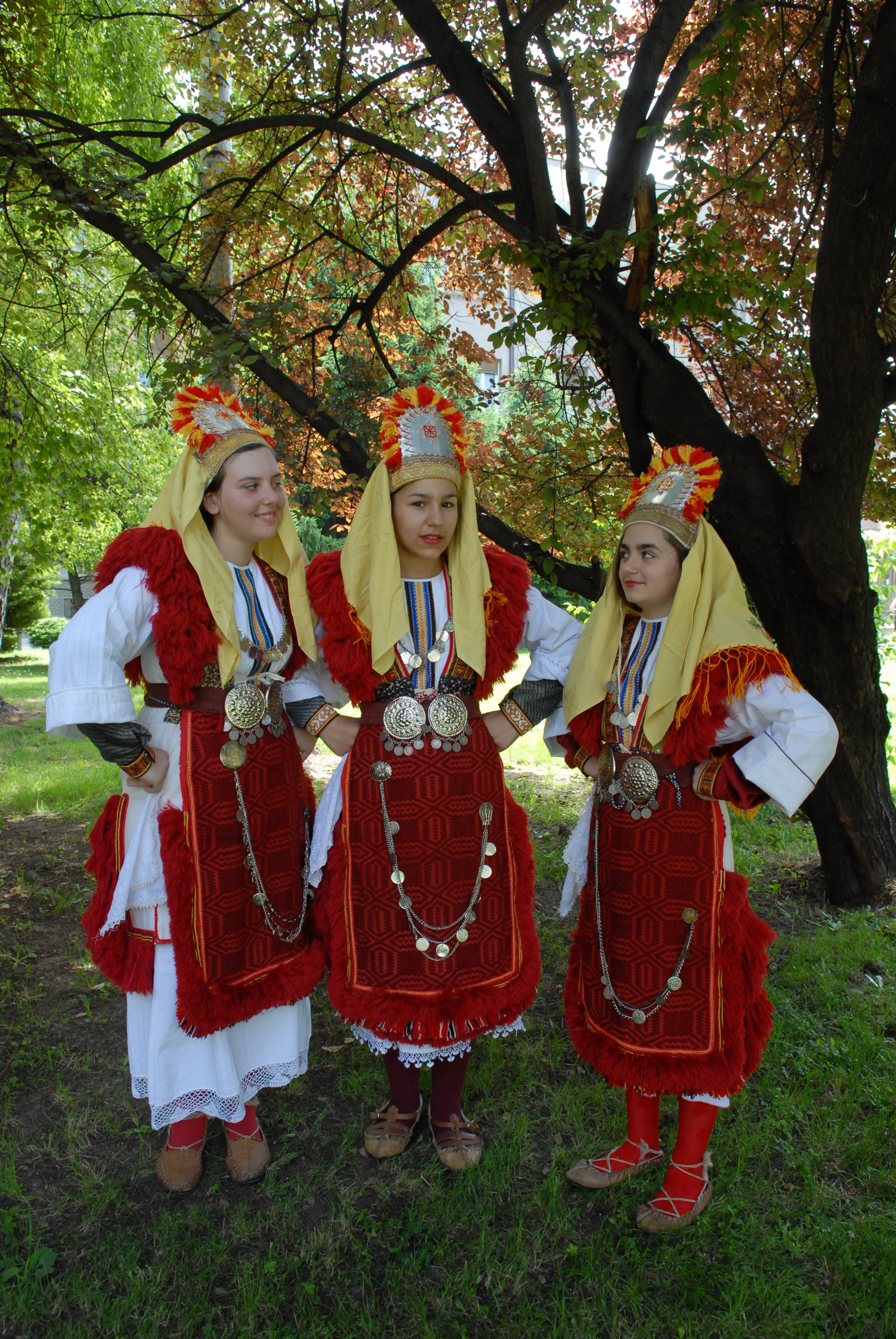 Mariovska nosija